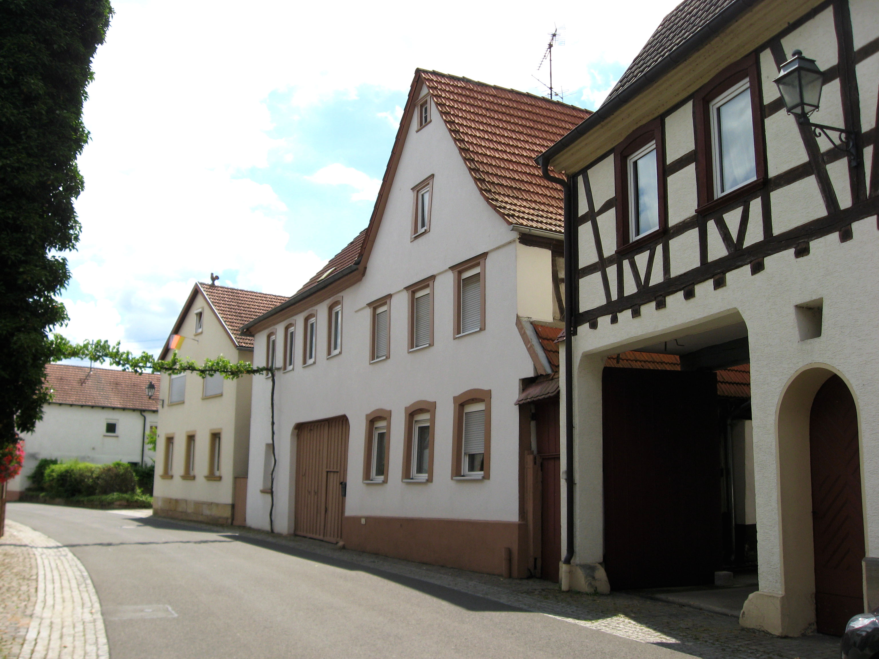 Hofanlage Hauptstraße 66 in Dierbach; Giebelständiges Wohnhaus, der traufständische Torbau überbaut; rechts daneben (Nr. 64) ähliche Bauweise, jedoch mit Fachwerk